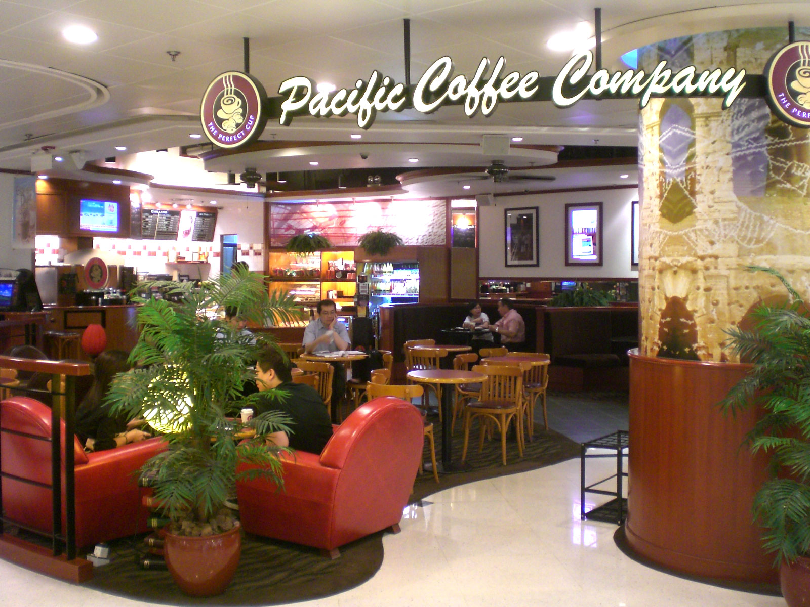 咖啡店太平洋咖啡@九龍灣德福廣場